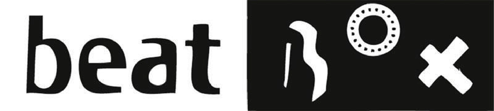 Dies ist das original Beatbox Logo, direkt aus den Händen des beatbox Gründers Markus Kammann der die Urheberrechte hat.